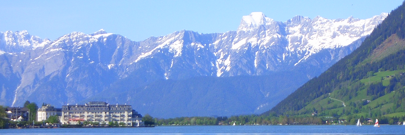 Der Zeller See im österreichischen Zell am See (Salzburg). Blick Richtung Norden, starker Zoom: Das große Gebäude links ist das Grand Hotel Salzburgerhof von Zell am See. Im Hintergrund das Steinerne Meer, überragt vom Gipfelbereich des Großen Hundstod (2593 m). Links hinten Hocheisspitze (2523 m, Hochkalterstock). Vorne Südabbruch des Steinernen Meers über Saalfelden, von links: Praghorn (2134m), zurückgesetzt Gipfel das Seehorn (2322 m), Finsterbachscharte (1998 m), Finsterbachkopf (2164 m), dahinter Großer Hundstod, Windbachkopf (2220 m) und Schindlköpfe (2357m). Ganz rechts Mitterberg, Abhänge der Schwalbenwand